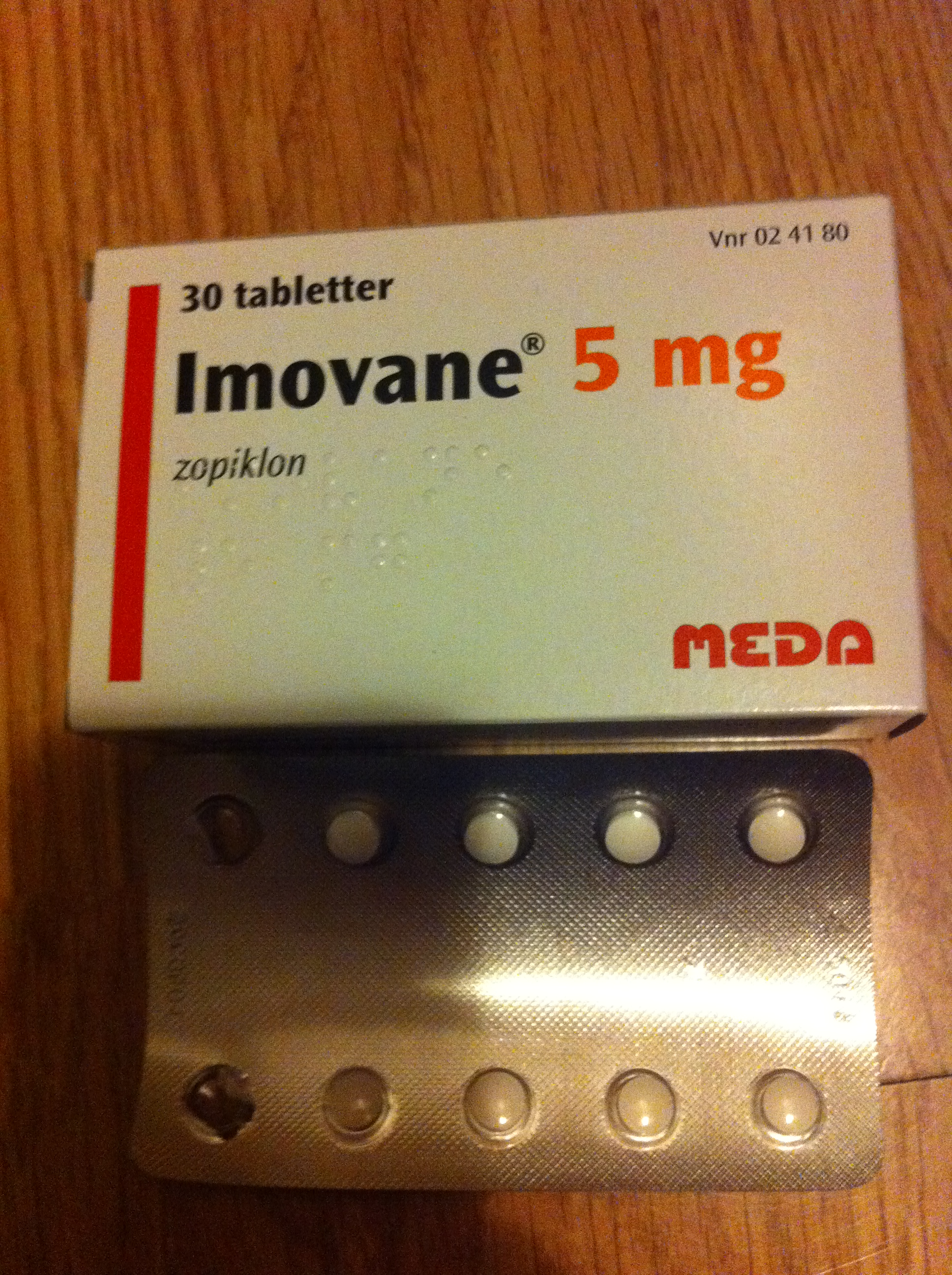 Imovane, ett sömnmedel innehållande zopiklon.